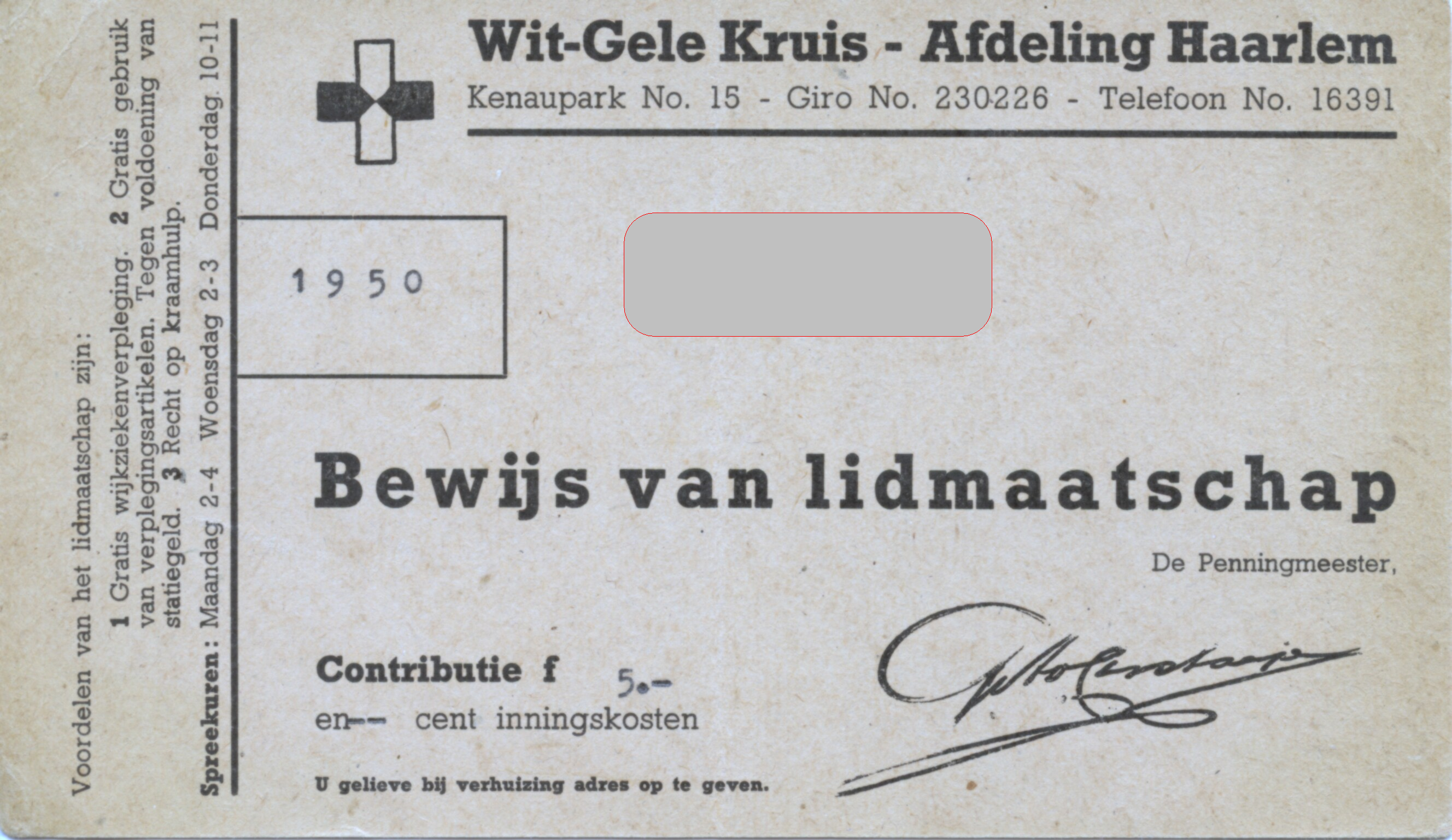 lidmaataschapskaart wit-gele-kruis uit 1950